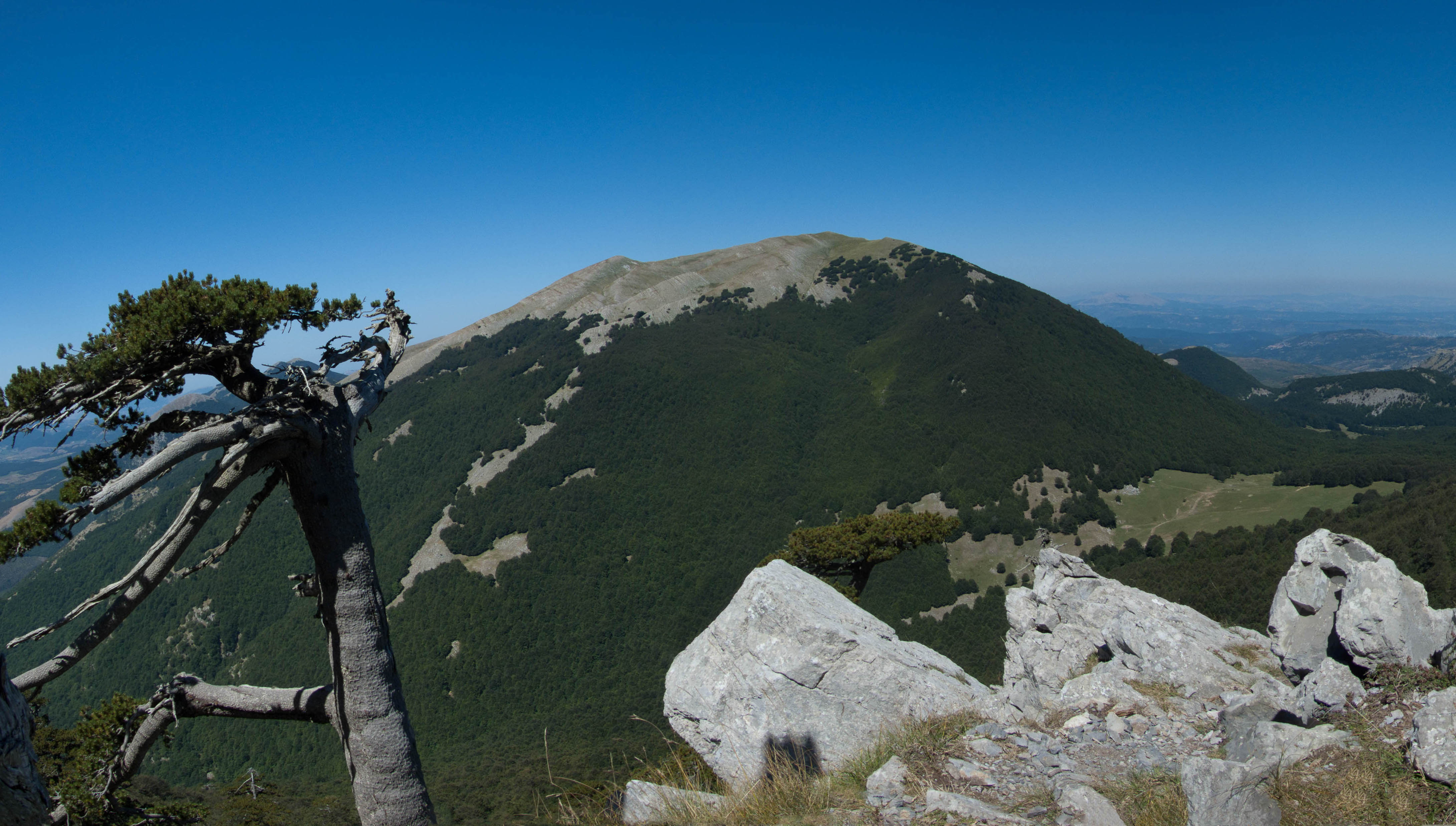 Versante sud-est di Serra del Prete